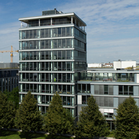 Etablissement principal de limango à Munich.